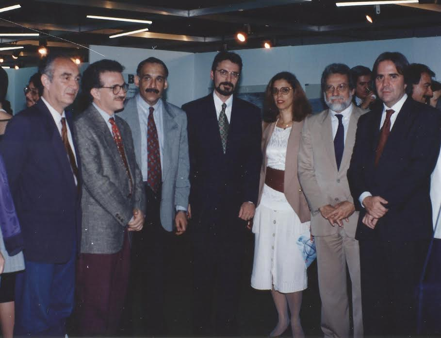 Da esquerda para direita: 1. Miguel Briante - Curador Fundador da 1ª Bienal de Curitiba (1993/1994) 2. Osvaldo Salerno - Curador Adjunto da 1ª Bienal de Curitiba 3. Ticio Escobar - Curador da Bienal de Curitiba na 1ª Edição da Bienal 4. Luiz Ernesto Meyer Pereira- Secretário da Cultura e Turismo do Estado do Paraná 5. Sônia Regina Reis Costa - Assessora de Assuntos Internacionais, MINC 6. Fernando Guimarães Reis - Embaixador e Subsecretário-geral de Assuntos Políticos, de MRE 7. Luiz Roberto do Nascimento Silva - Ministro da Cultura do Governo do Brasil.